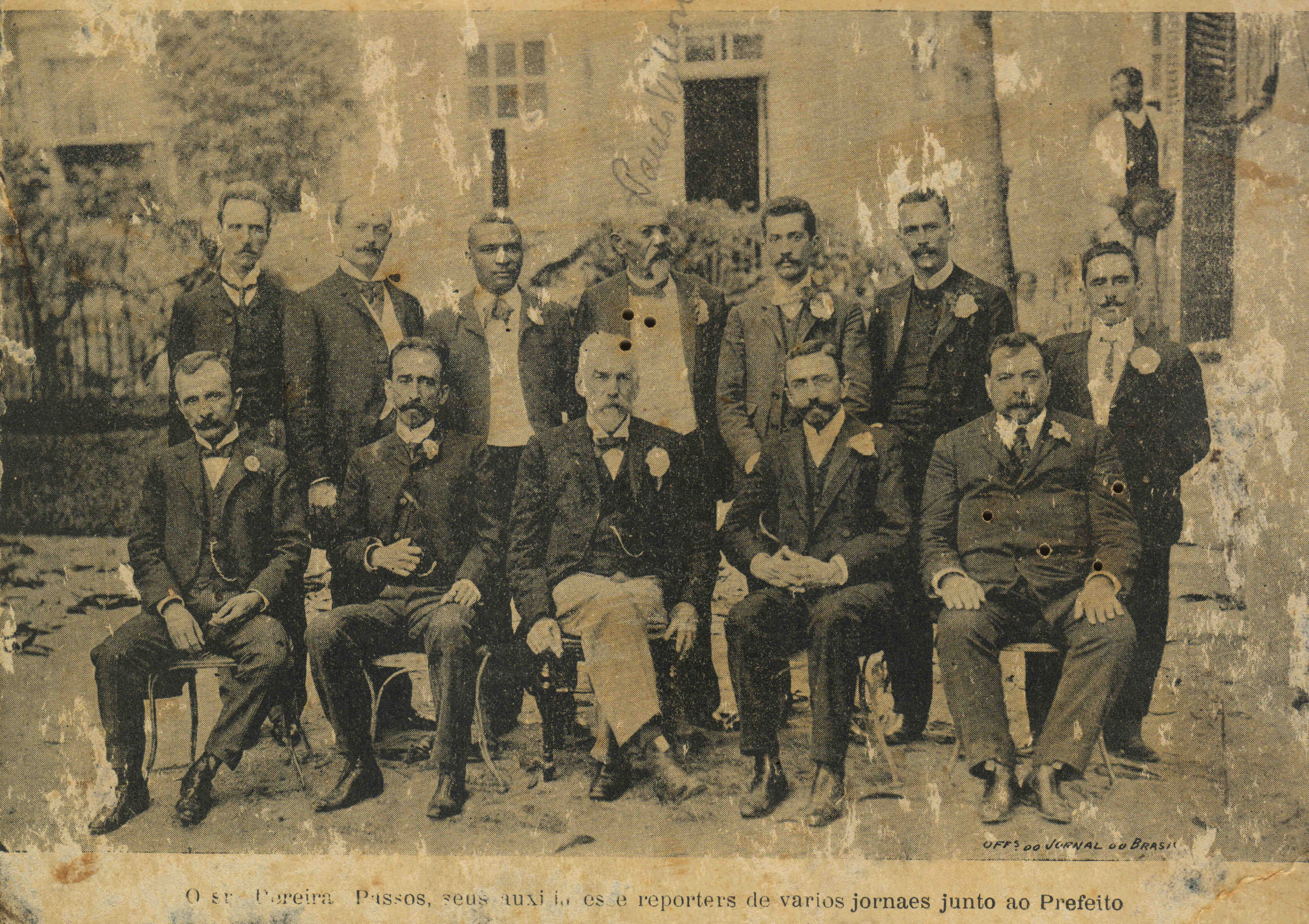 O prefeito Pereira Passos (1836-1913) cercado por seus auxiliares e repórteres de diversos jornais. Atrás de Pereira Passos, de pé, está o paisagista francês Paul Villon (1841-1905), então um dos auxiliares do prefeito.